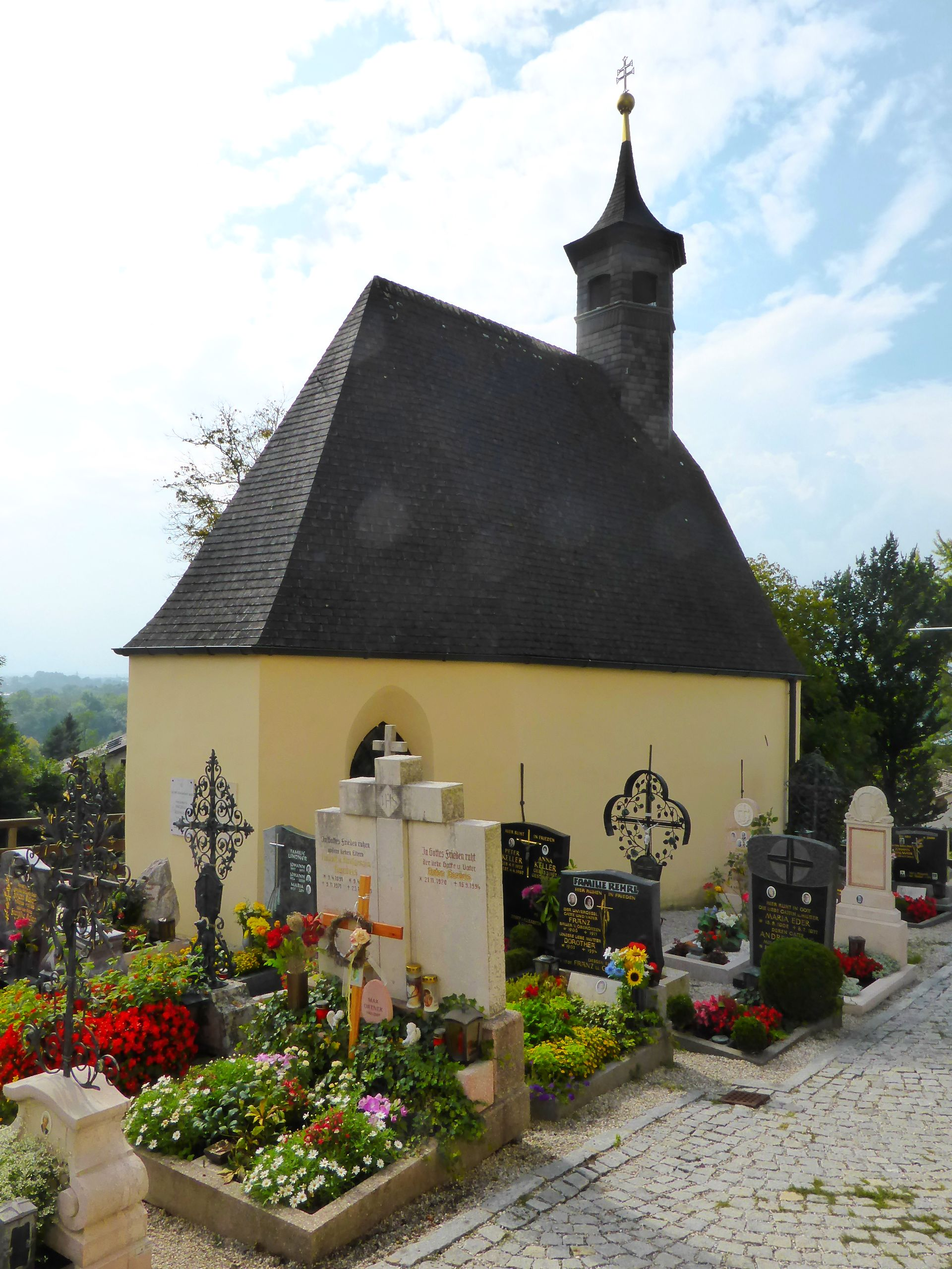 Friedhofskapelle hl. Laurentius